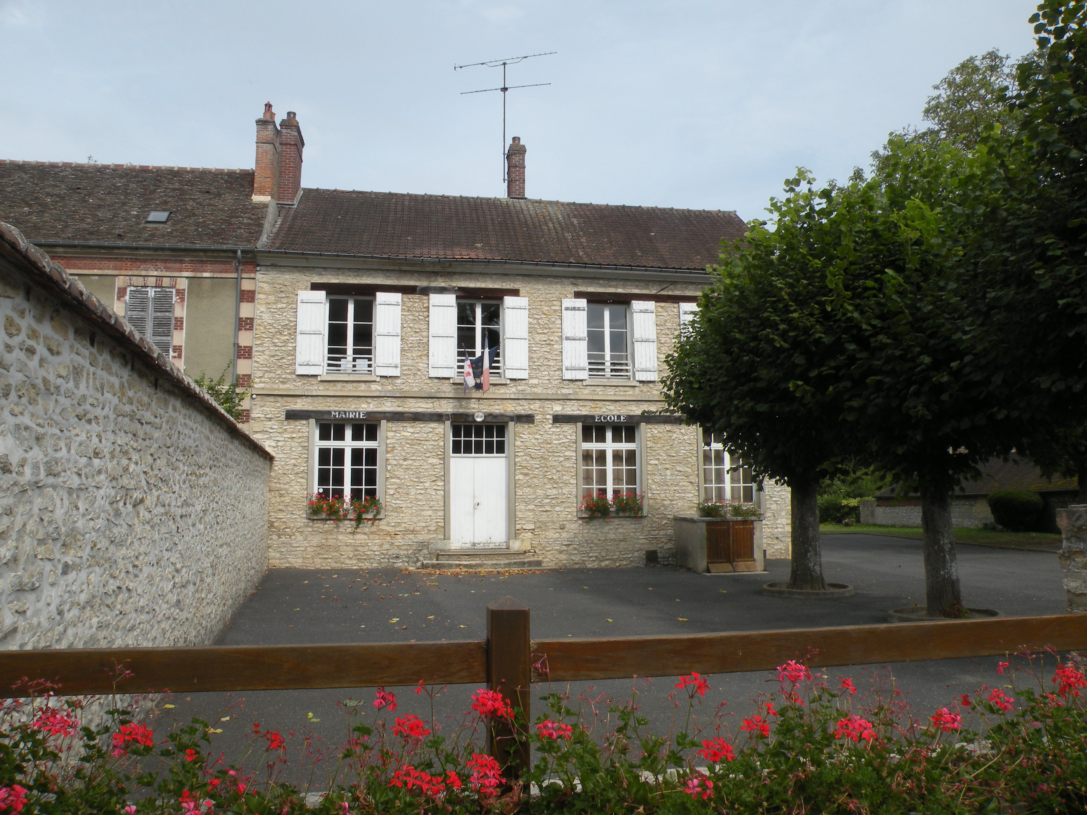 mairie Trie-la-Ville